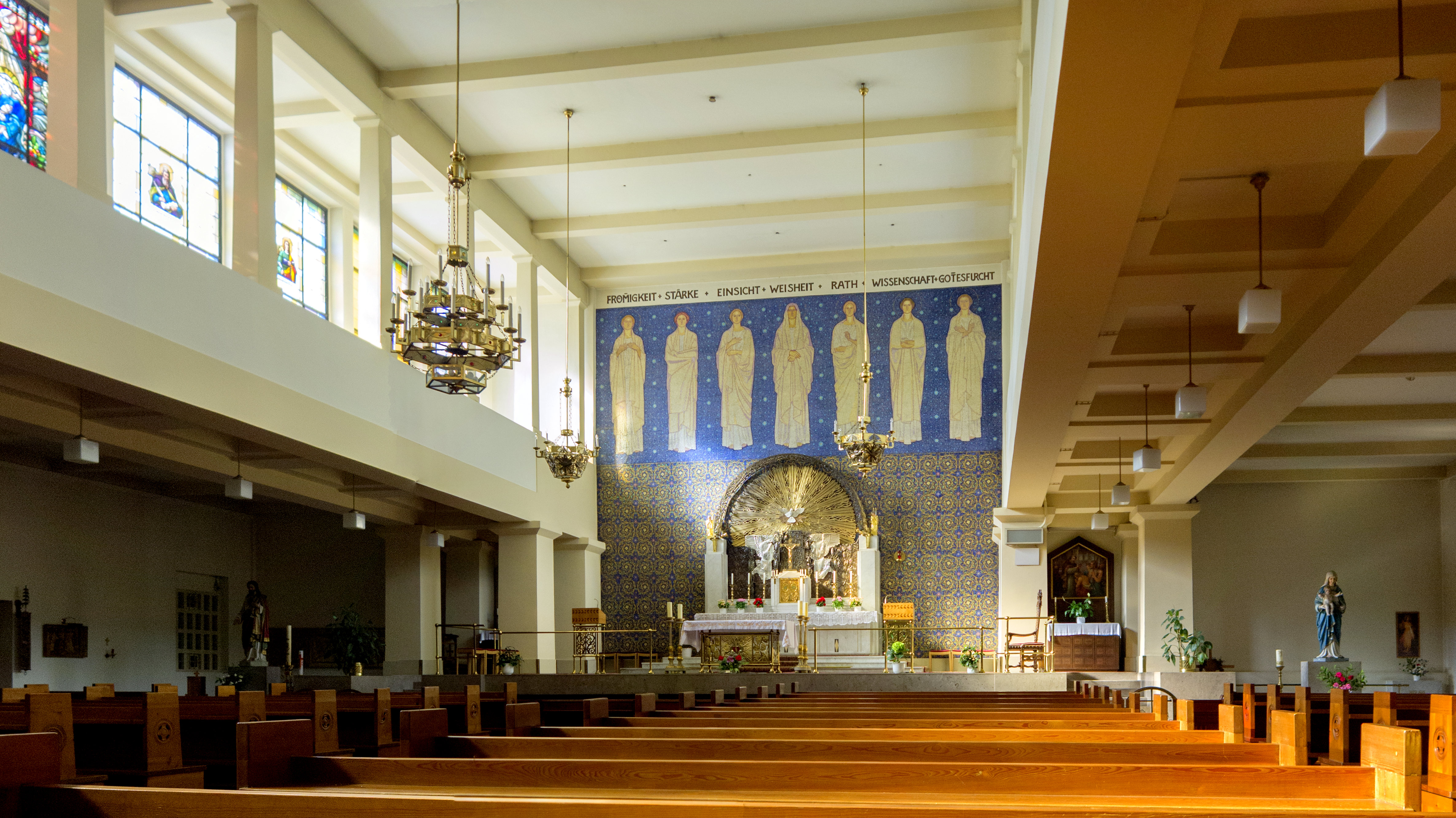 Schmelzer Pfarrkirche innen